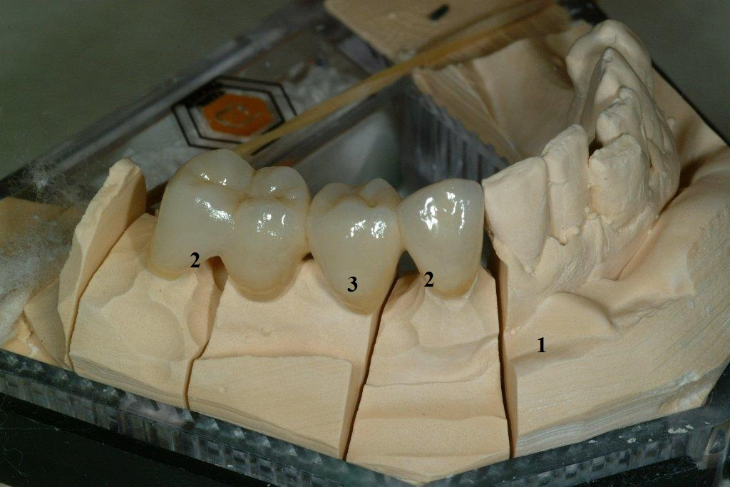 En bro i underkjeven som består av 3 ledd. 1) Avstøpning av tennene 2) Pilartann 3) Mellomledd (det området som mangler tann)